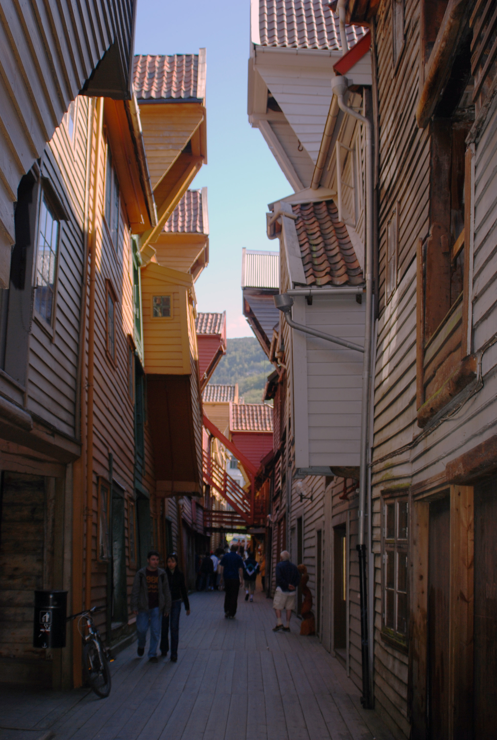 Houses in Bryggen, Bergen (Norway)